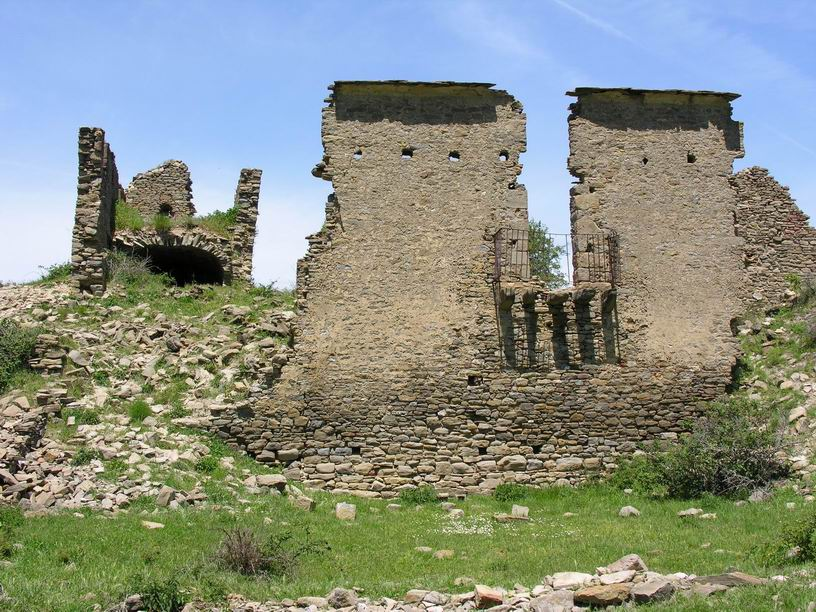 Escusaguas, Caldearenas